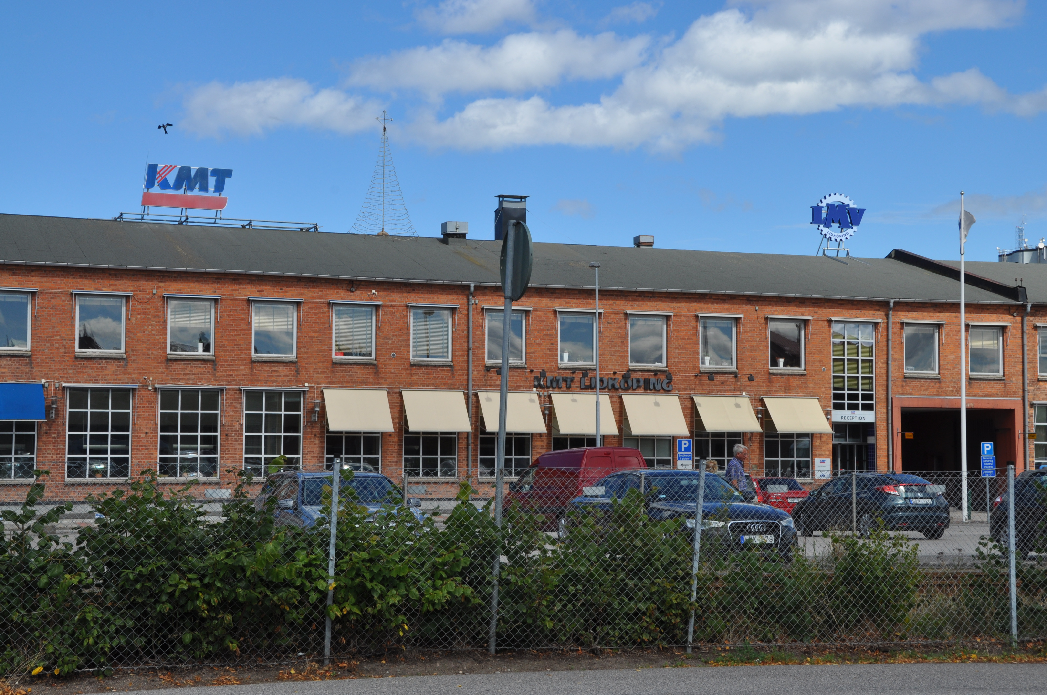 Byggnader för Lidköping Machine Tools, tidigare Lidköpings Mekaniska Vekstad